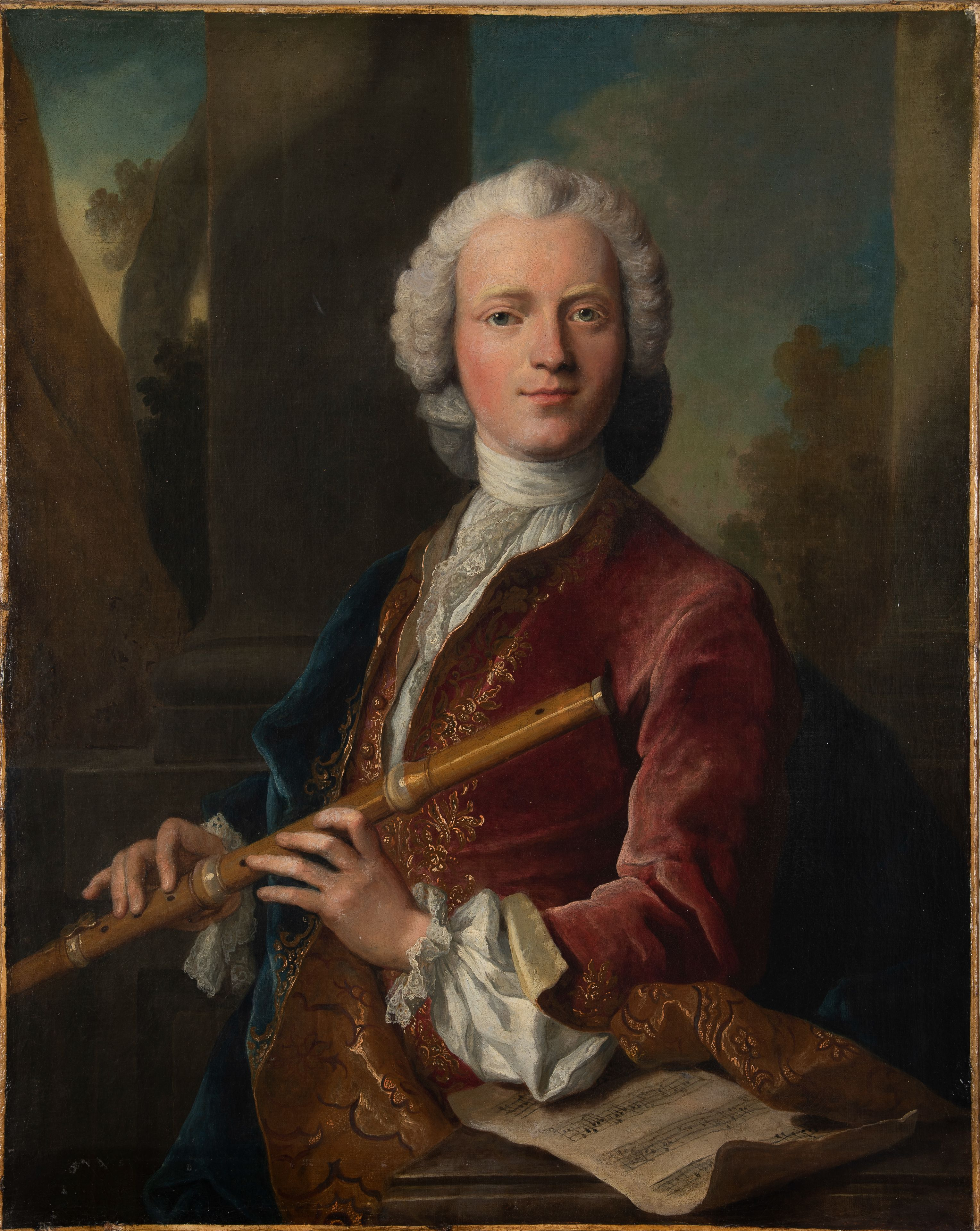 Portrait présumé de Michel Blavet (1700-1768)